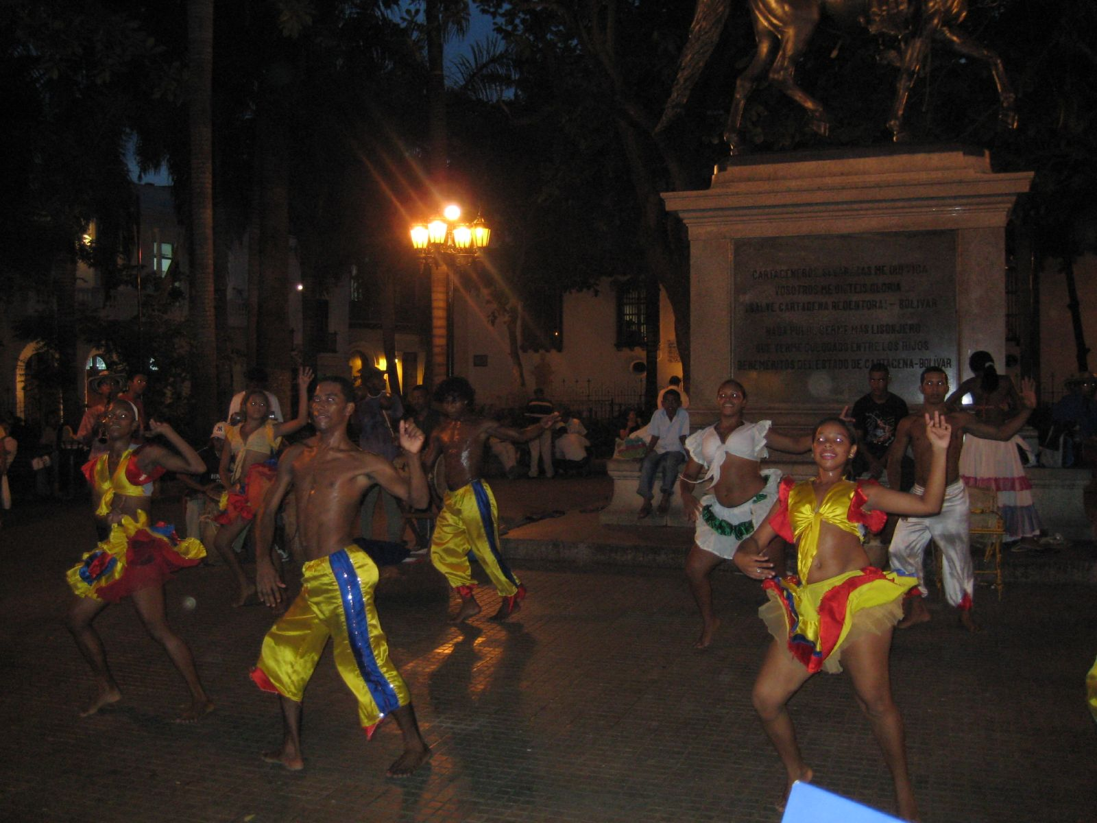 Danza del Mapale, Colombia